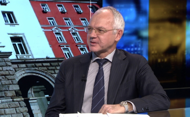 Васил Велев, председател на Управителния съвет на Асоциацията на индустриалния капитал в България (АИКБ).